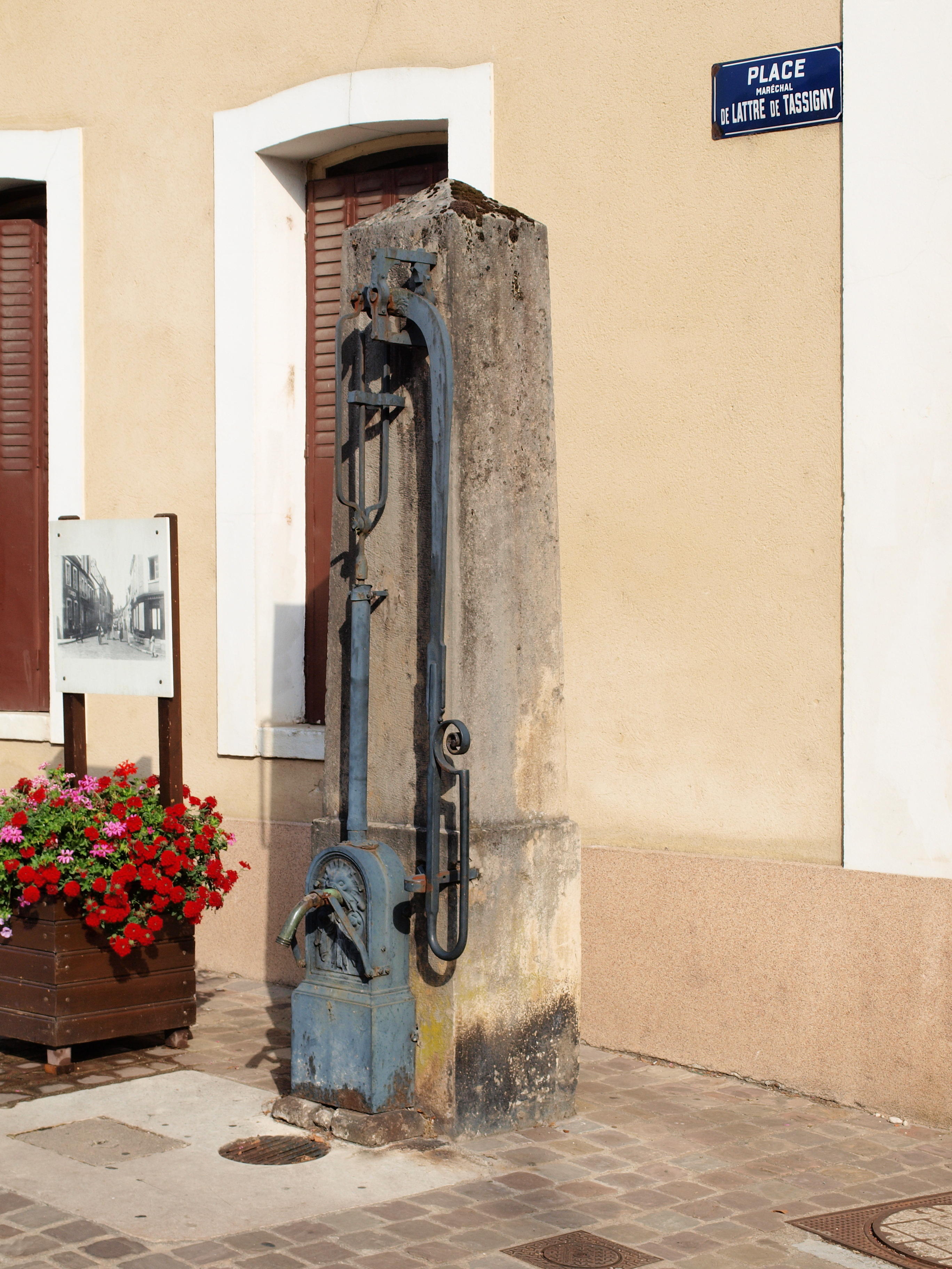 Au hasard des rues de Saint-Fargeau (Yonne, France)